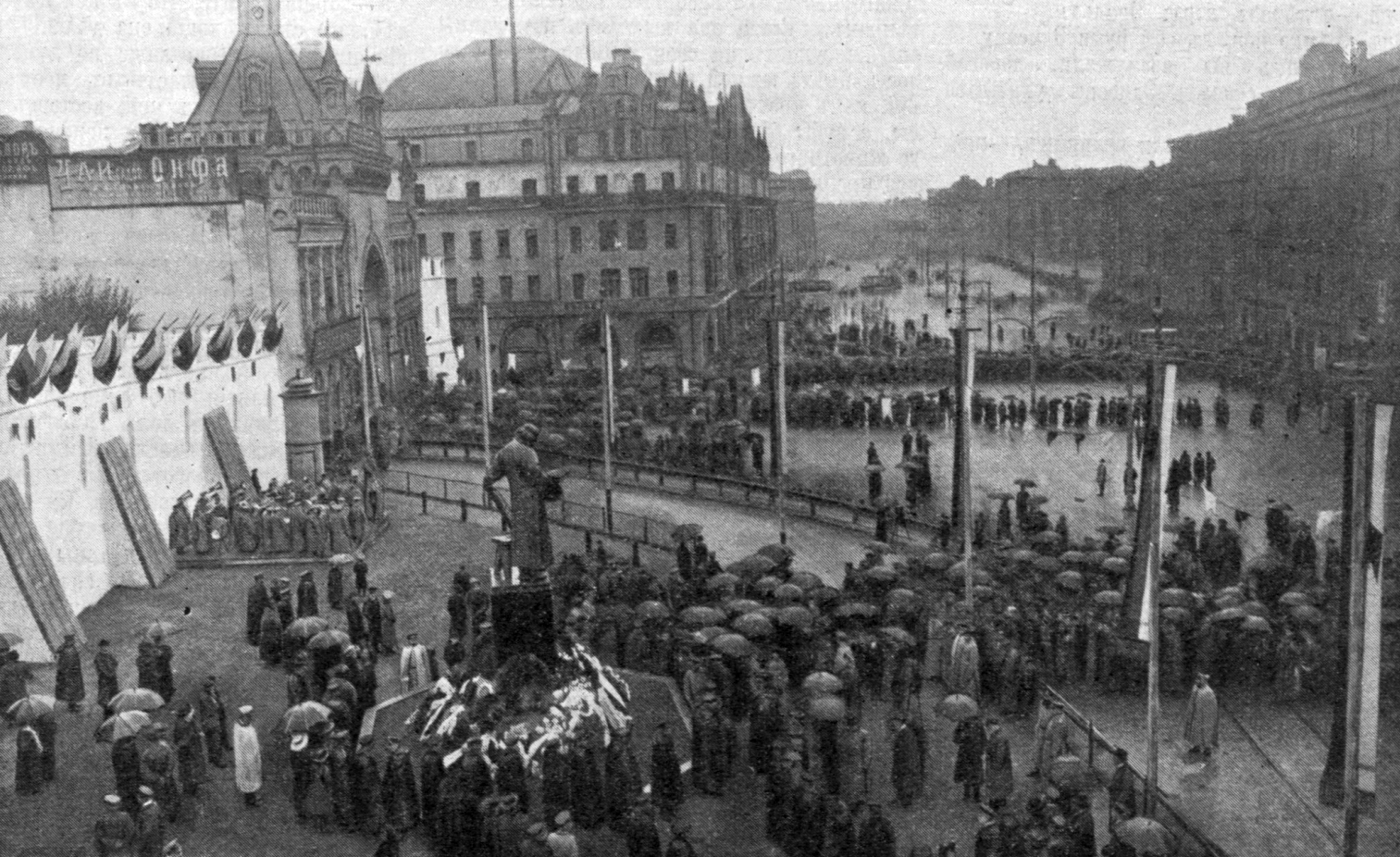 Открытие памятника первопечатнику Ивану Фёдорову в Москве; in the background, left side: Hotel Metropol